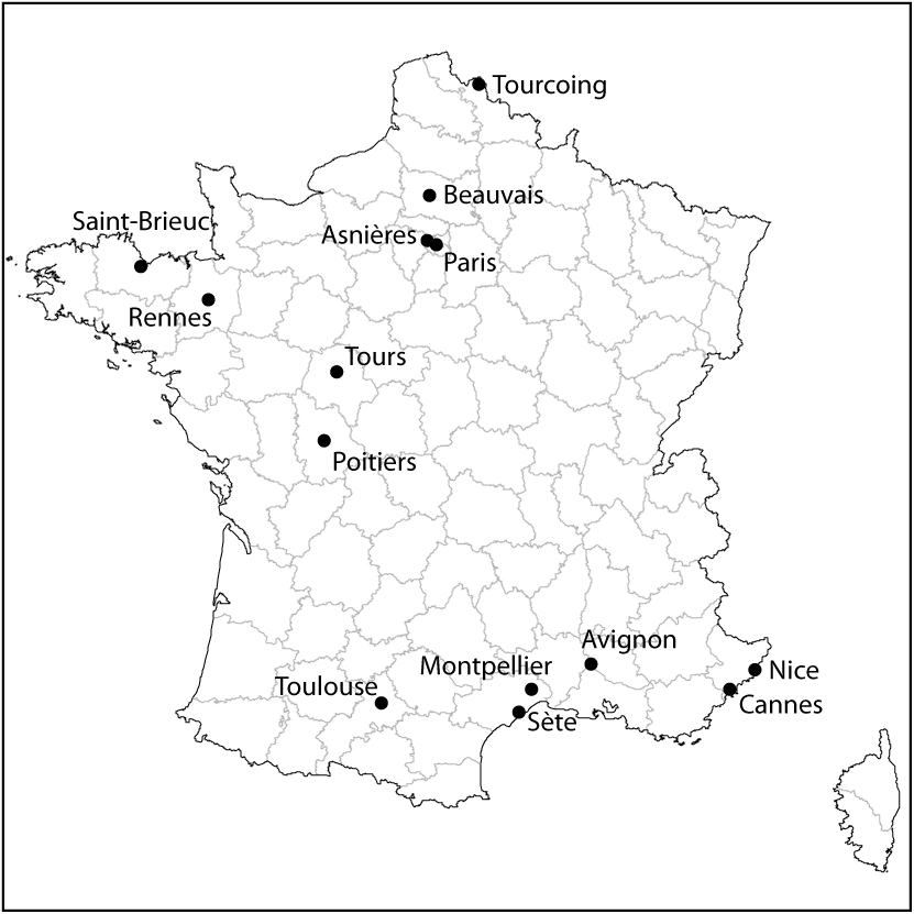 Carte des clubs engagés dans le championnat de France Pro A de volley-ball 2006-2007